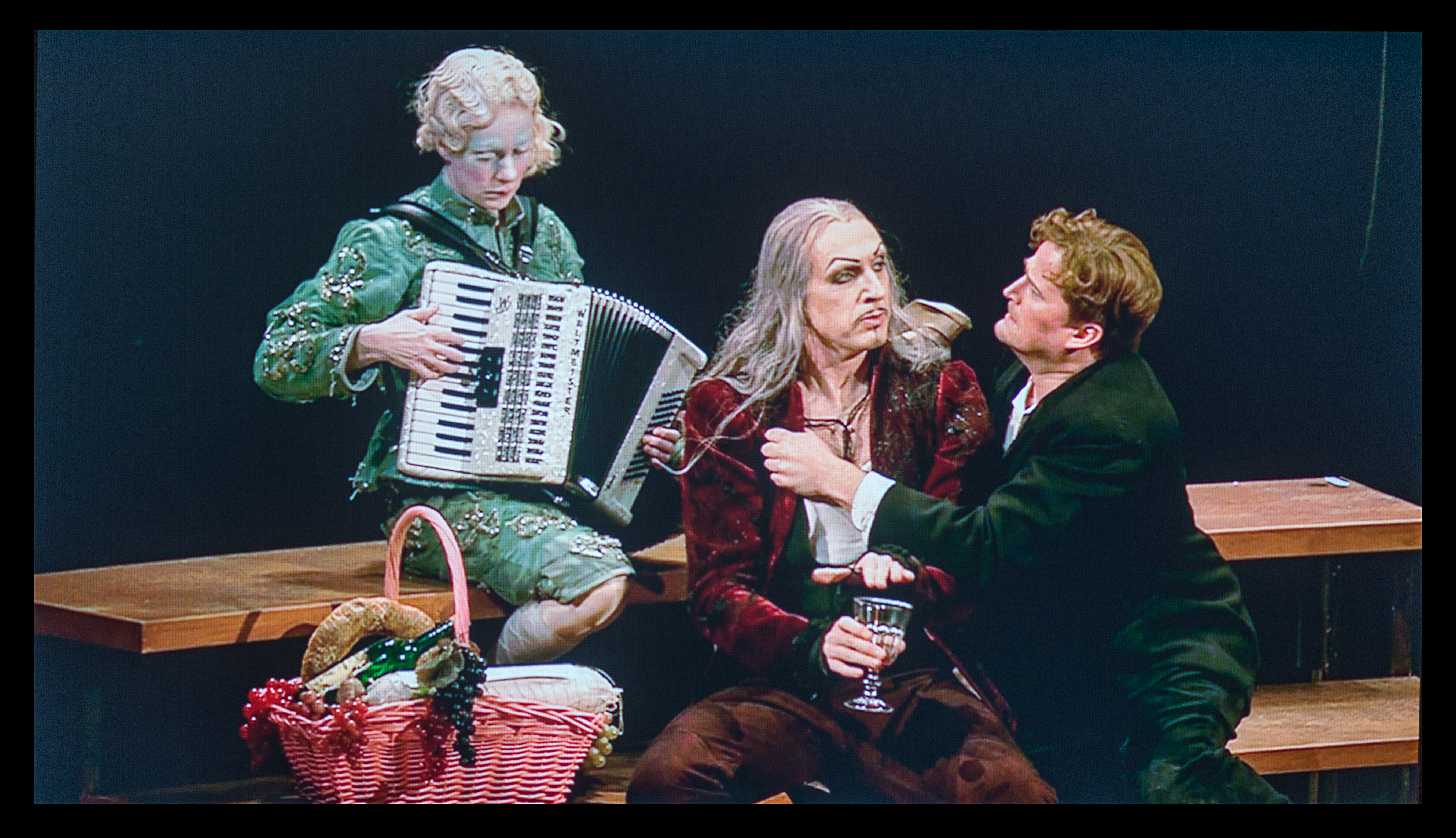 L'elisir d'amore, December 2013